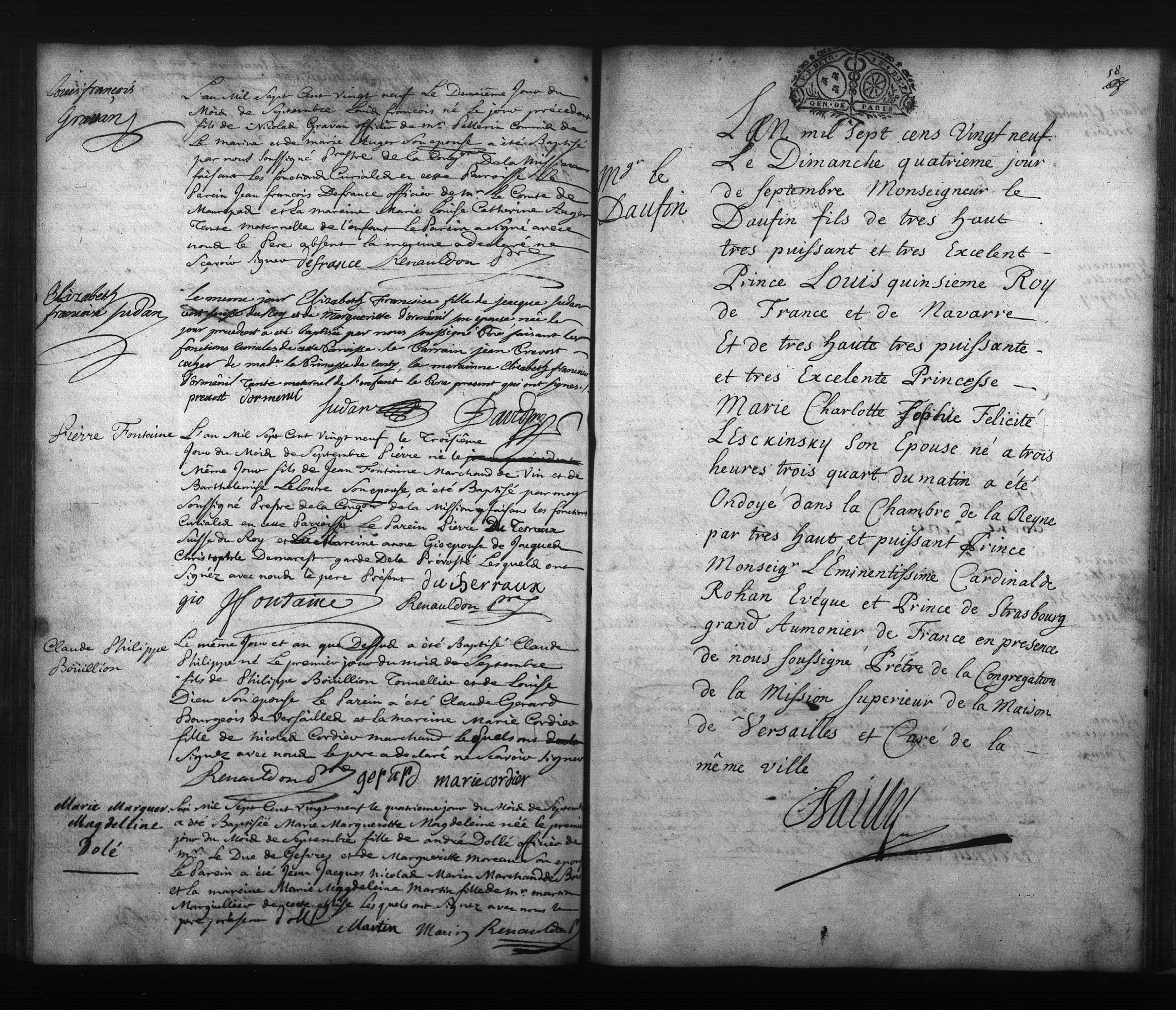 archives Yvelines